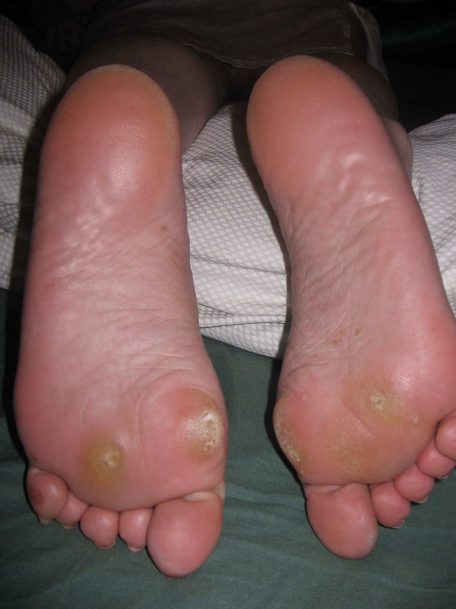 Verrues Plantaires, très douloureuses